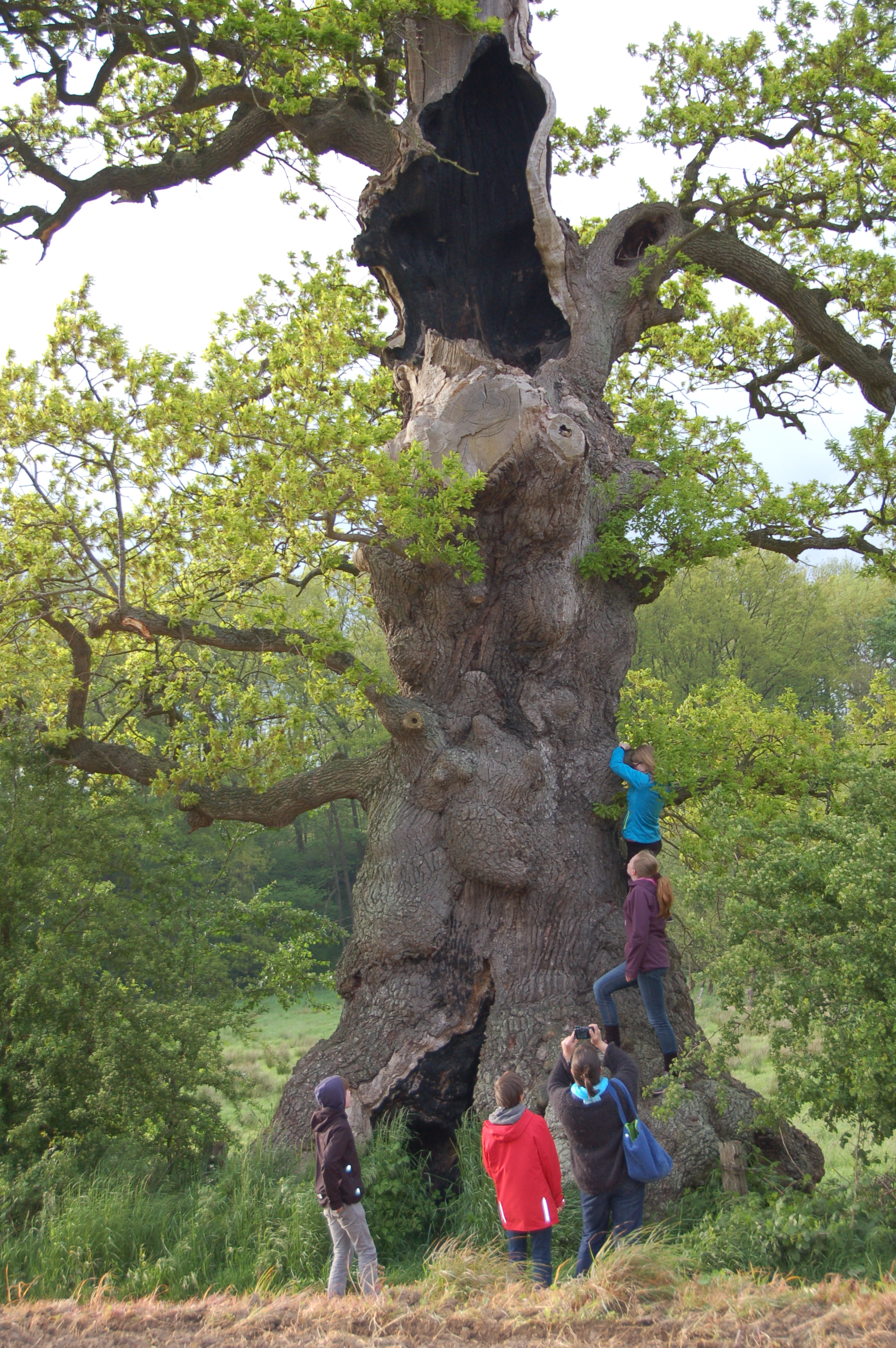 Die Kattholzeiche ist eine ca. 400 Jahre alte Stieleiche, deren Stammumfang (gemessen auf 1 m Höhe) 12,8 m beträgt.Naturdenkmal im Kreis Plön in Schleswig-Holstein, Gemeinde Belau auf dem Gut Perdöl östlich von Wankendorf